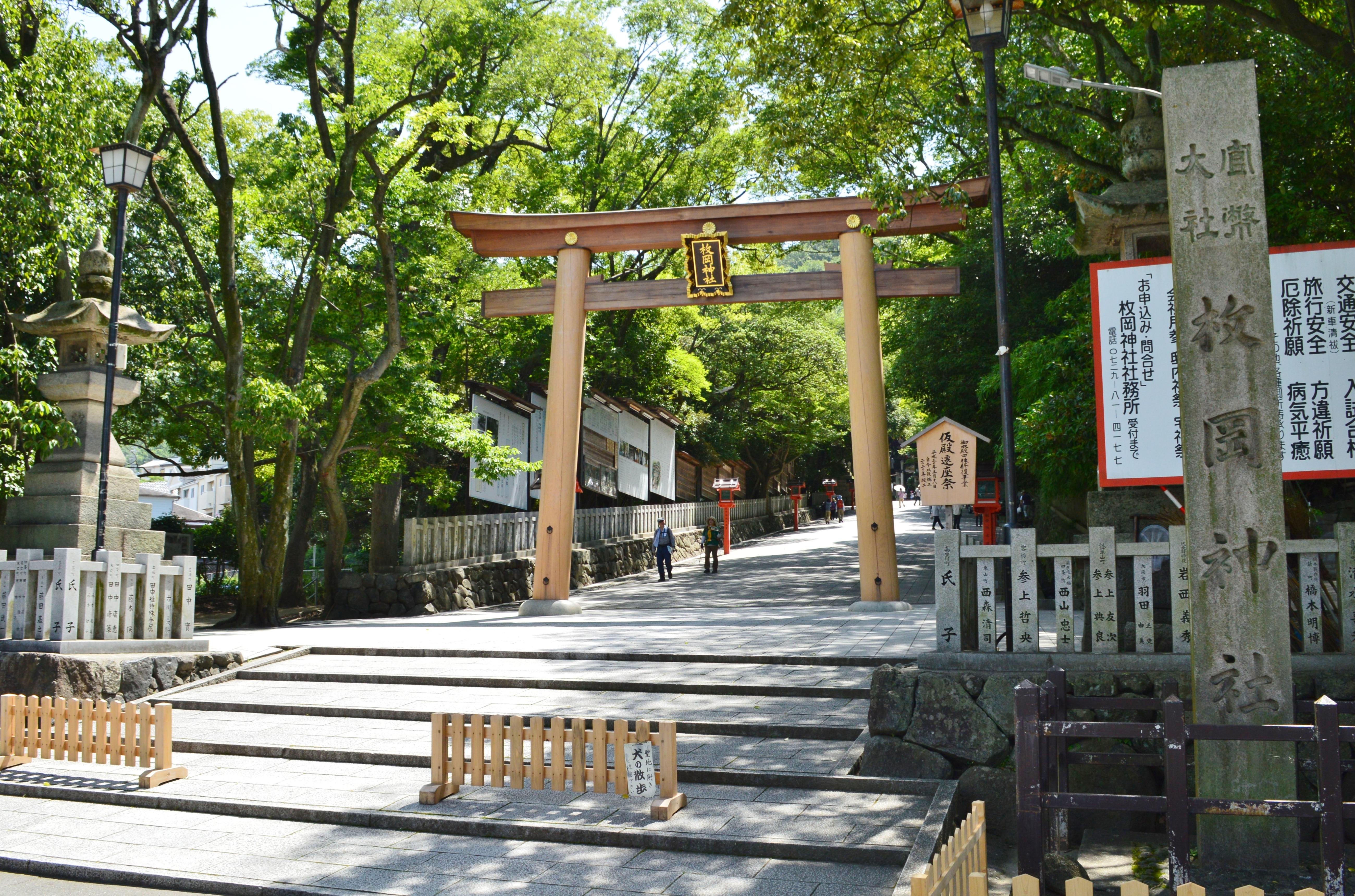 枚岡神社 二の鳥居・社号標